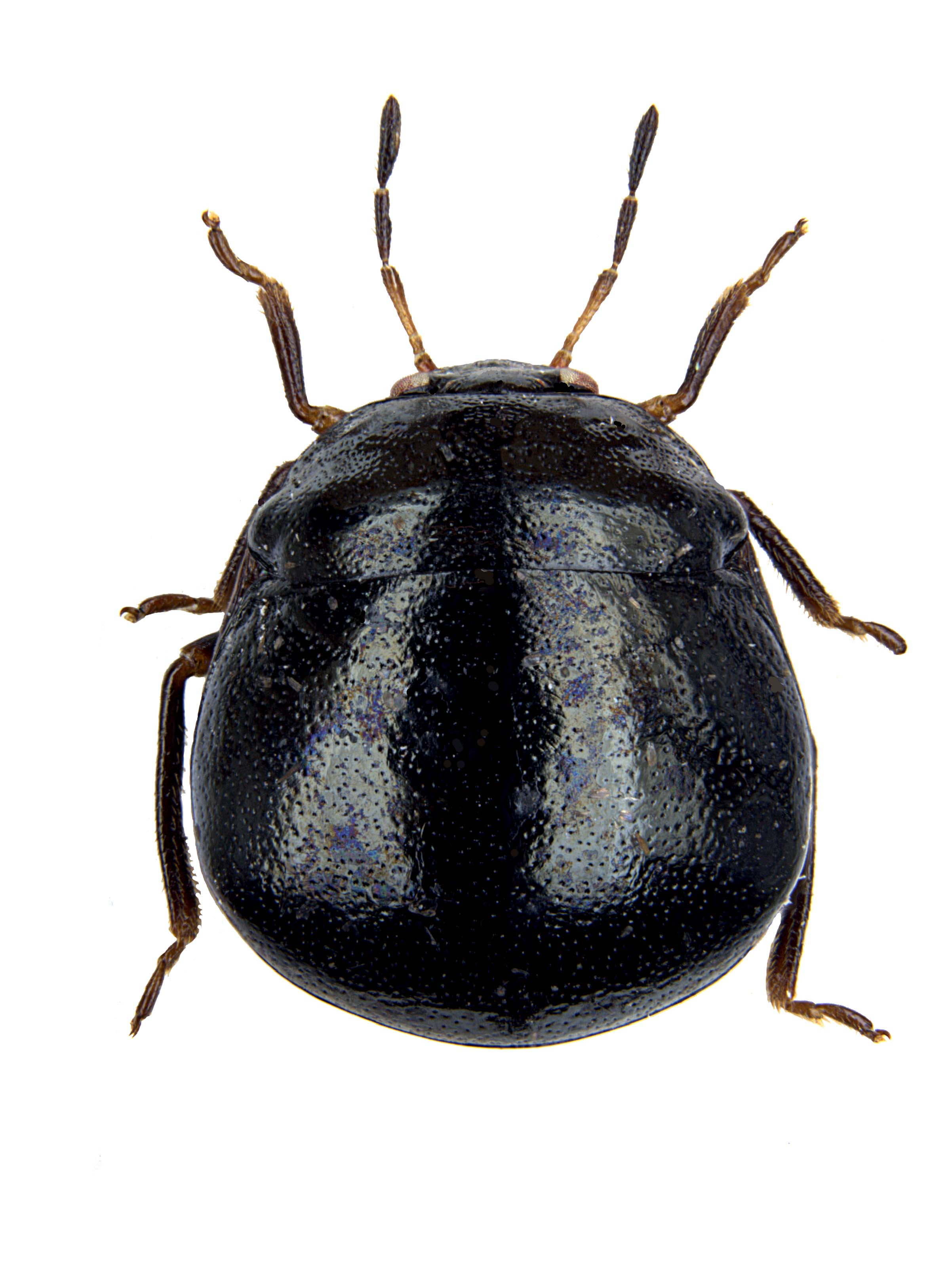 Coptosoma scutellatum, Habitus, specimen in Zoologische Staatssammlung München, Foto: Marianne Müller